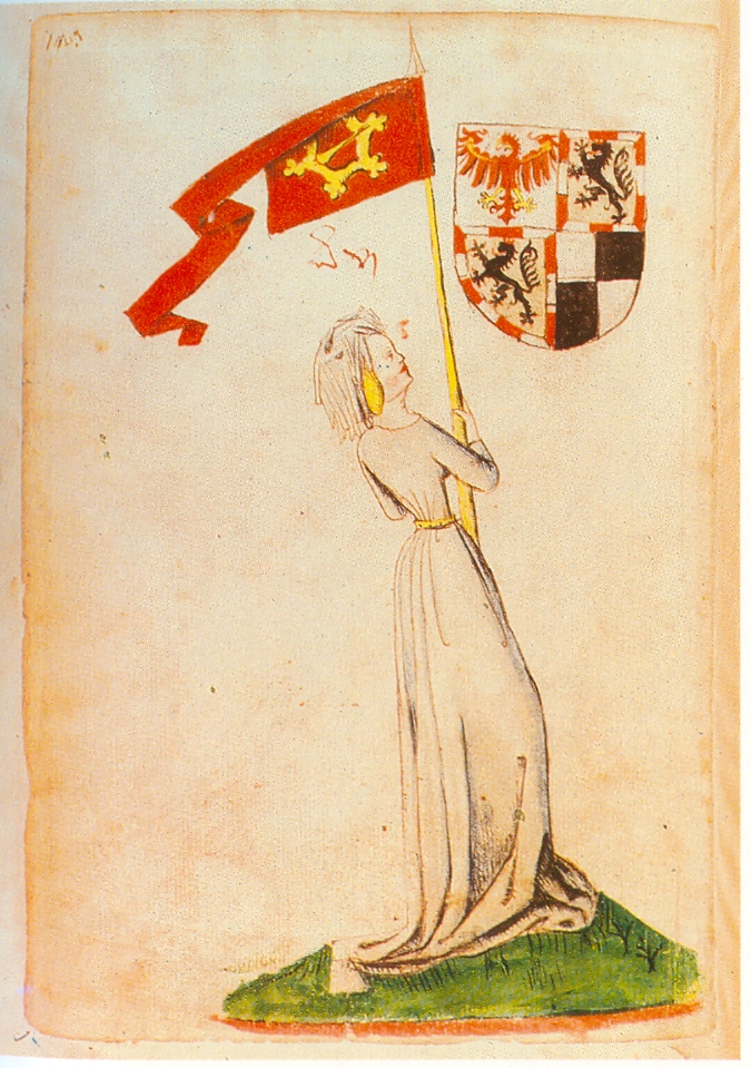 Ingeram-Codex der ehemaligen Bibliothek Cotta Jungfrau mit dem Banner in der Fürspang, daneben das Wappen Brandenburg